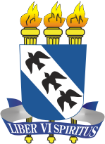 Brasão da Universidade do Estado do Rio Grande do Norte - UERN. Blazon of the Universidade do Estado do Rio Grande do Norte - UERN. Imagem tratada com o Macromedia Fireworks. Image made with Macromedia Fireworks.